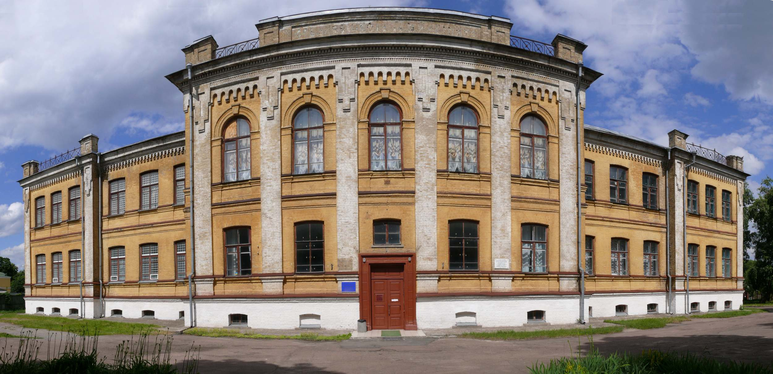 Чернігівський обласний художній музей ім. Григорія Галагана. Колишня жіноча гімназія. У цьому будинку, колишній жіночій гімназії в 1904 - 1911 р.р. навчалась активна учасниця боротьби за владу Рад на Україні перший голова Чернігівської ради робітничих і солдатських депутатів в 1918 р Софія Іванівна Соколовська (1894 - 1938). Світлина змонтована з 5-ти знімків. 2012 р. Чернігів.